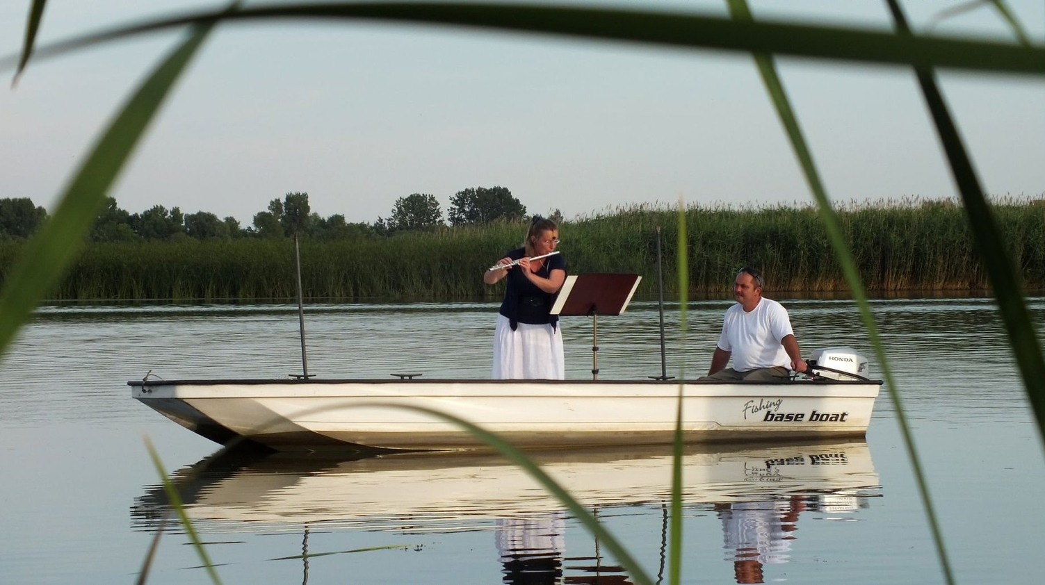 Hibay Éva fuvolaelőadása egy csónakban állva a Tiszán, Poroszlónál